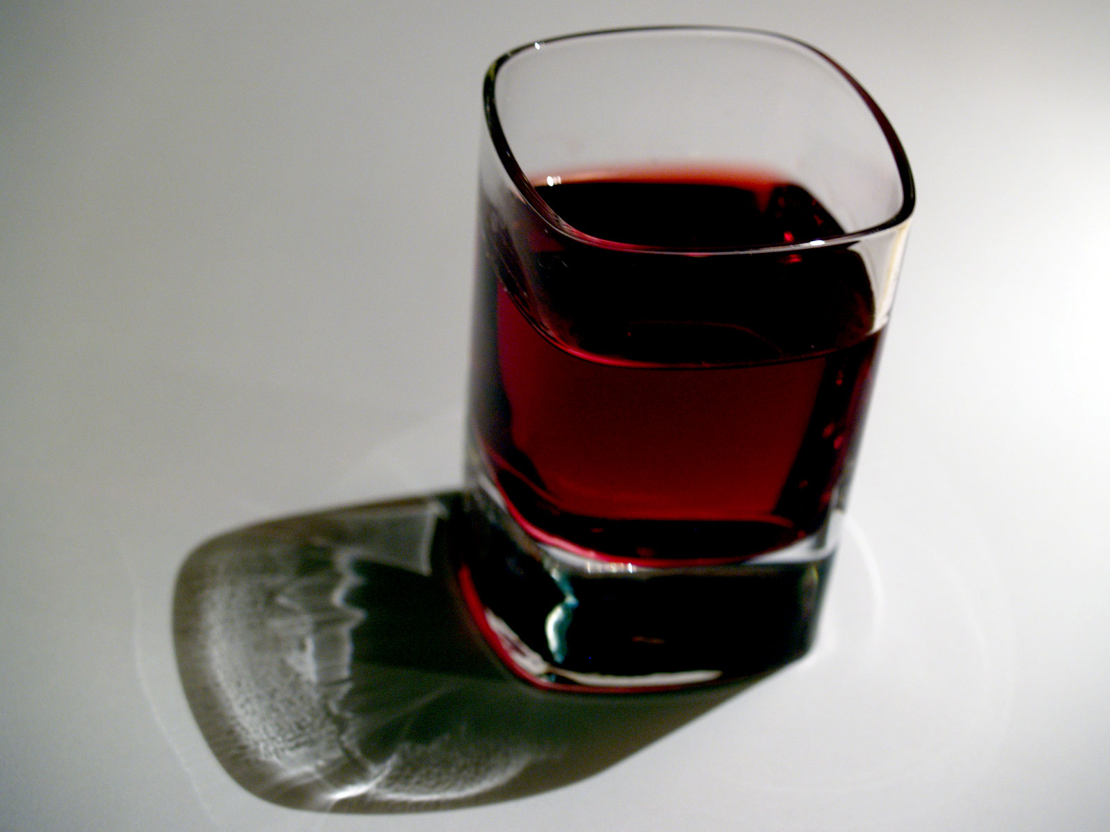 Hindbærsnaps